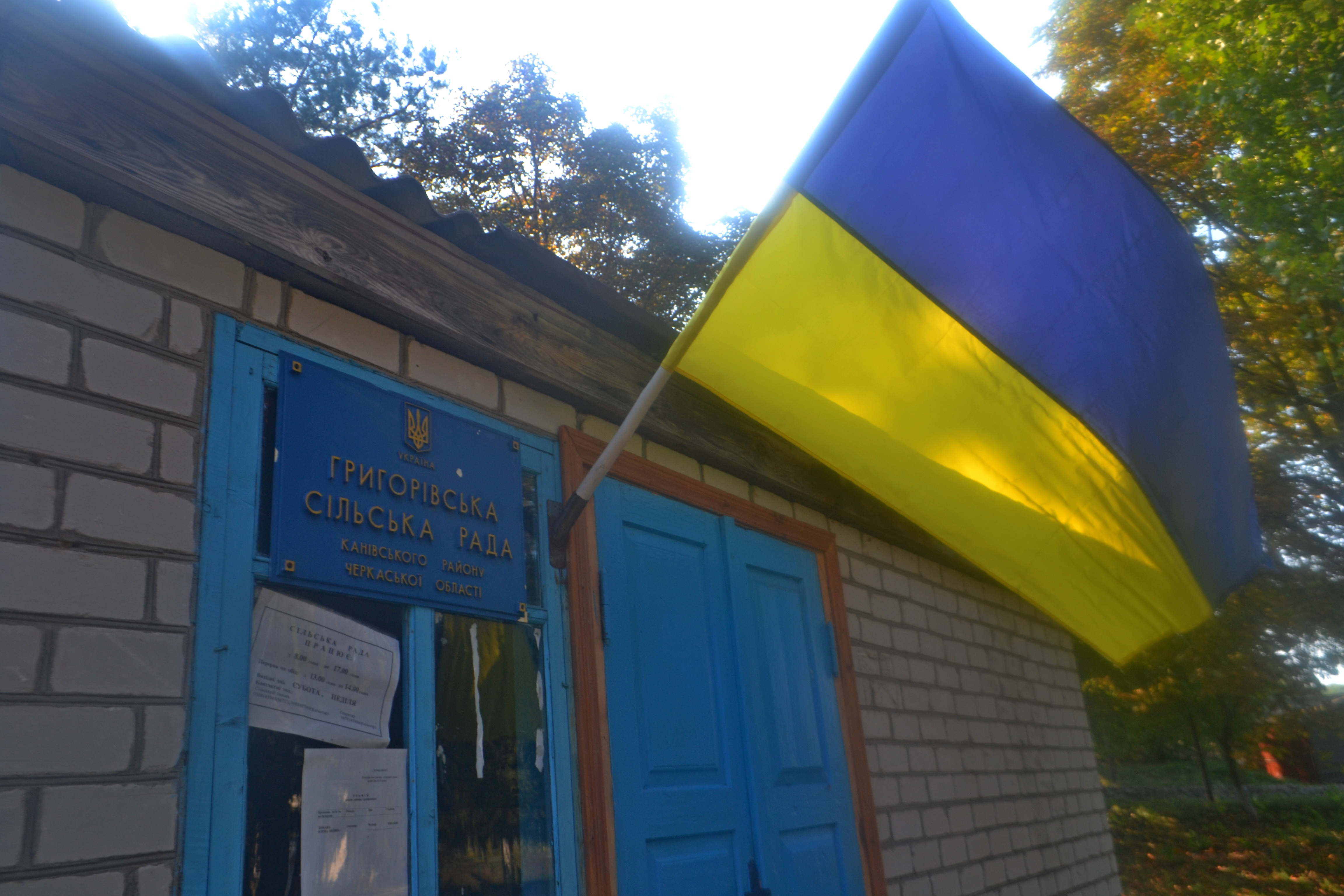 сільська рада в с.Григорівка (Канівський район). фото 2